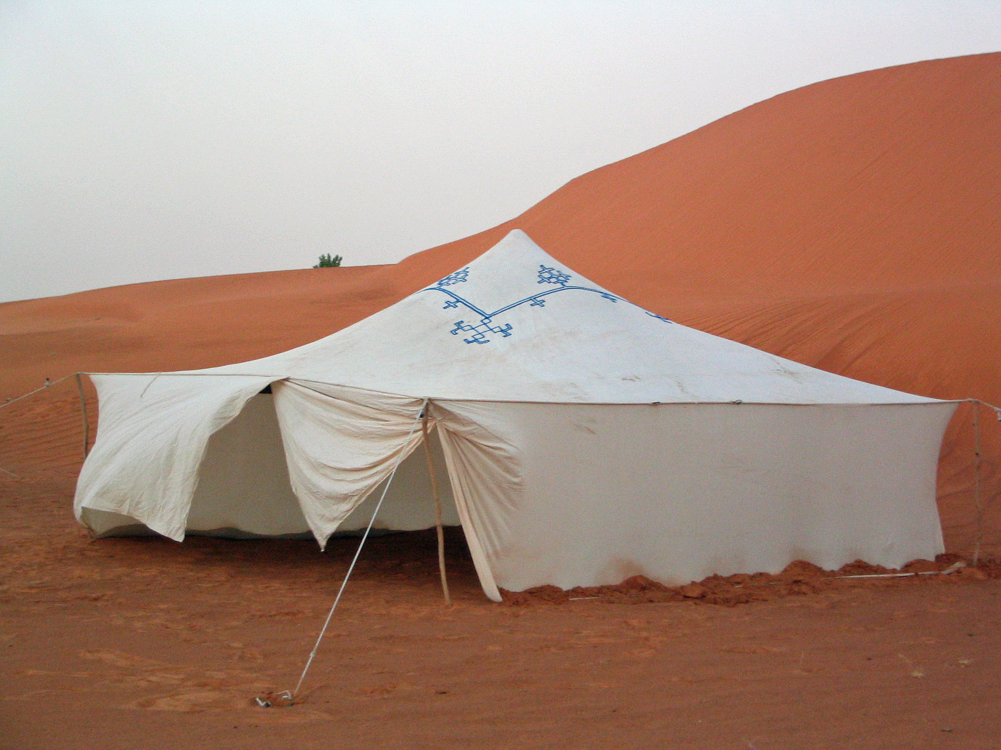 Khaïma (tente) dans les dunes d'Ajouer (Mauritanie).